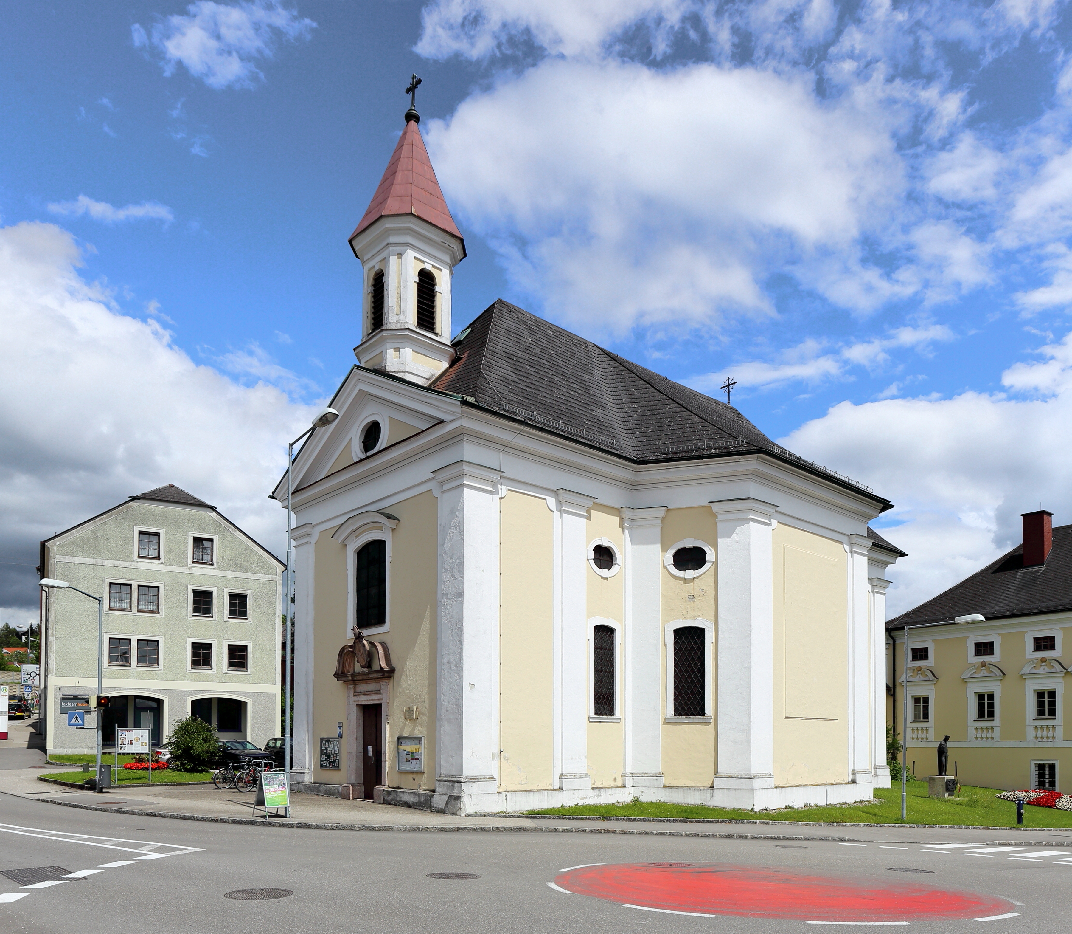 Westansicht der Dörflkirche in der oberösterreichischen Stadt Vöcklabruck. Erbaut durch Pilgrim von Weng im 12. Jahrhundert und um 1688 von Carlo Antonio Carlone zu einer Kreuzkuppelkirche umgebaut.